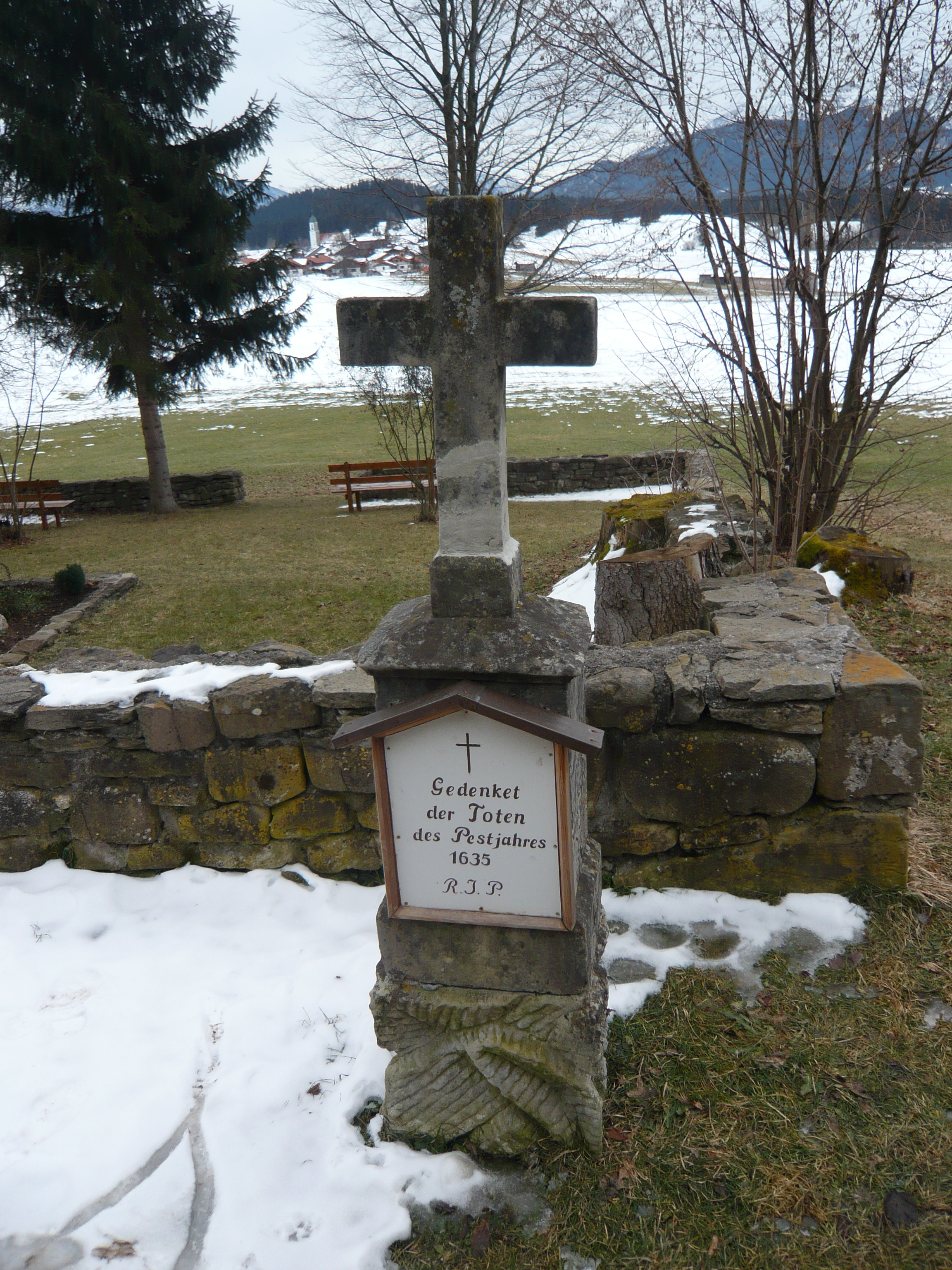 alter Grabstein mit Hinweis auf den Pestfriedhof in Zell (Ostallgäu)